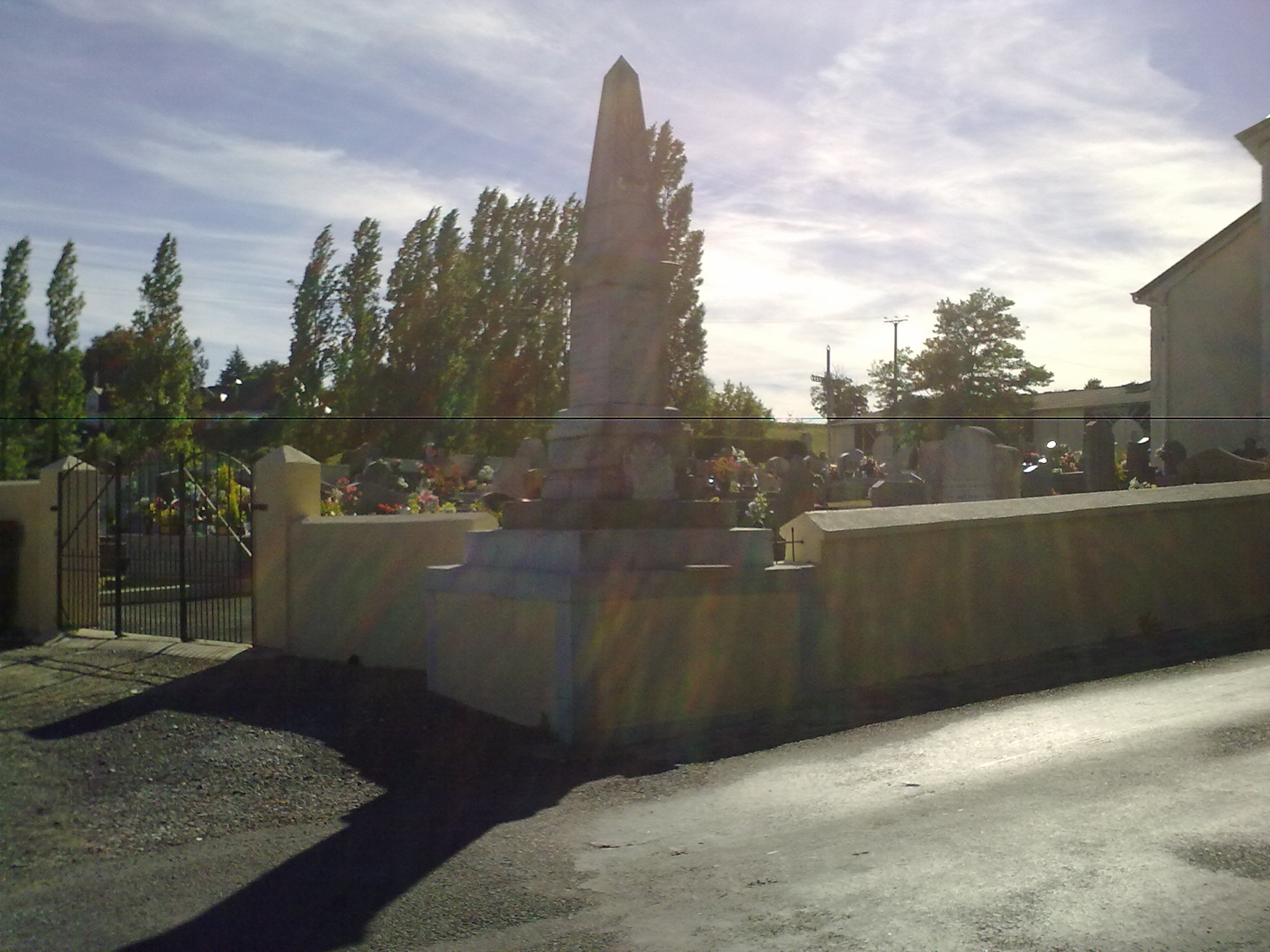 Saint-Armou le 30 août 2010, France.